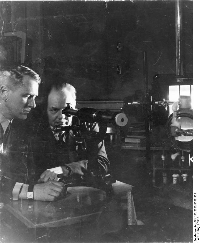 Scherl Prof. Dr. Reche beobachtet das Spectrum von Blutserum, Leipzig 13093-37